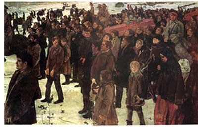 Похороны рабочего